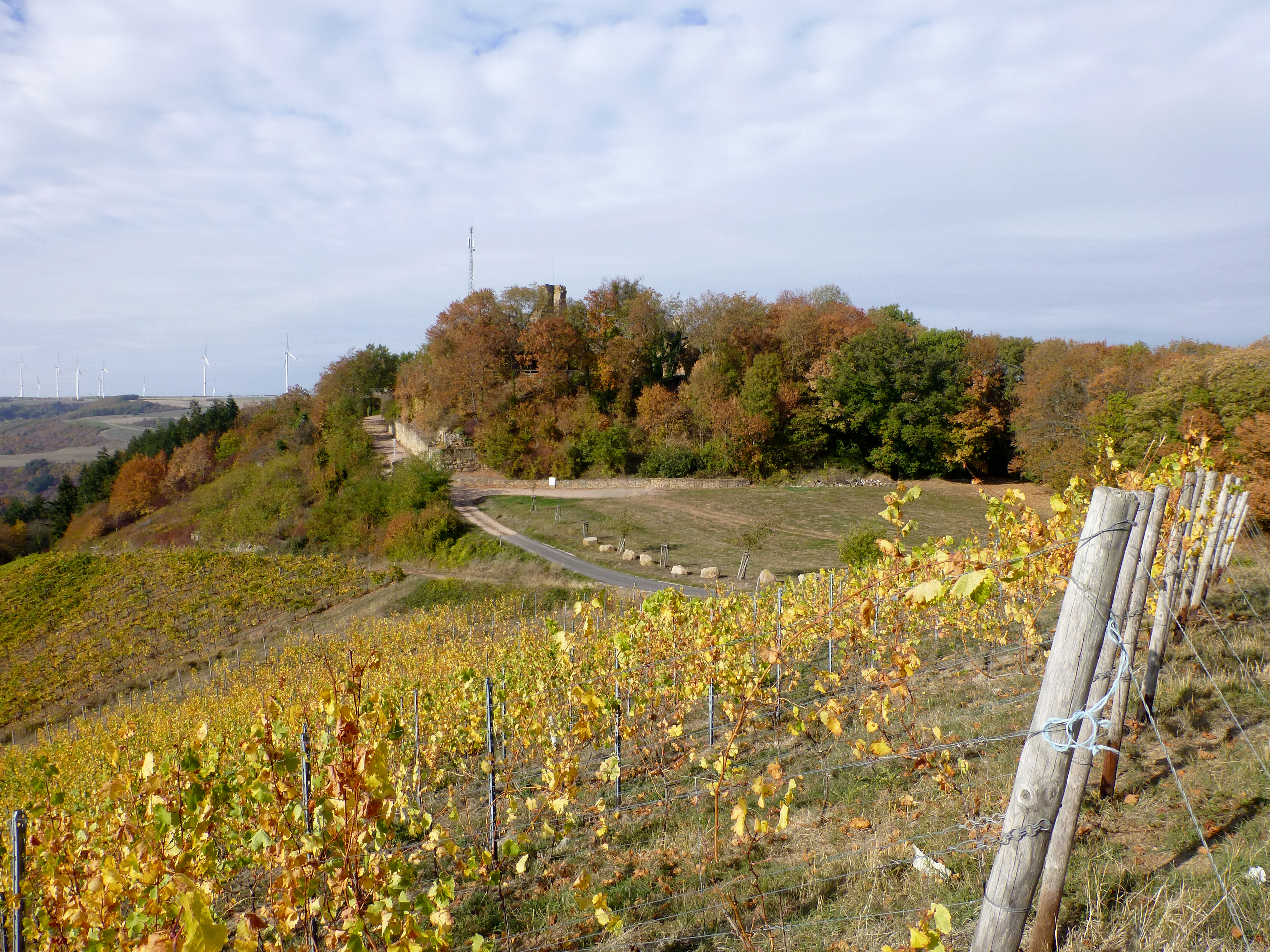 Moschellandsberg (oder Schloßberg); Ansicht der Ostsüdostseite